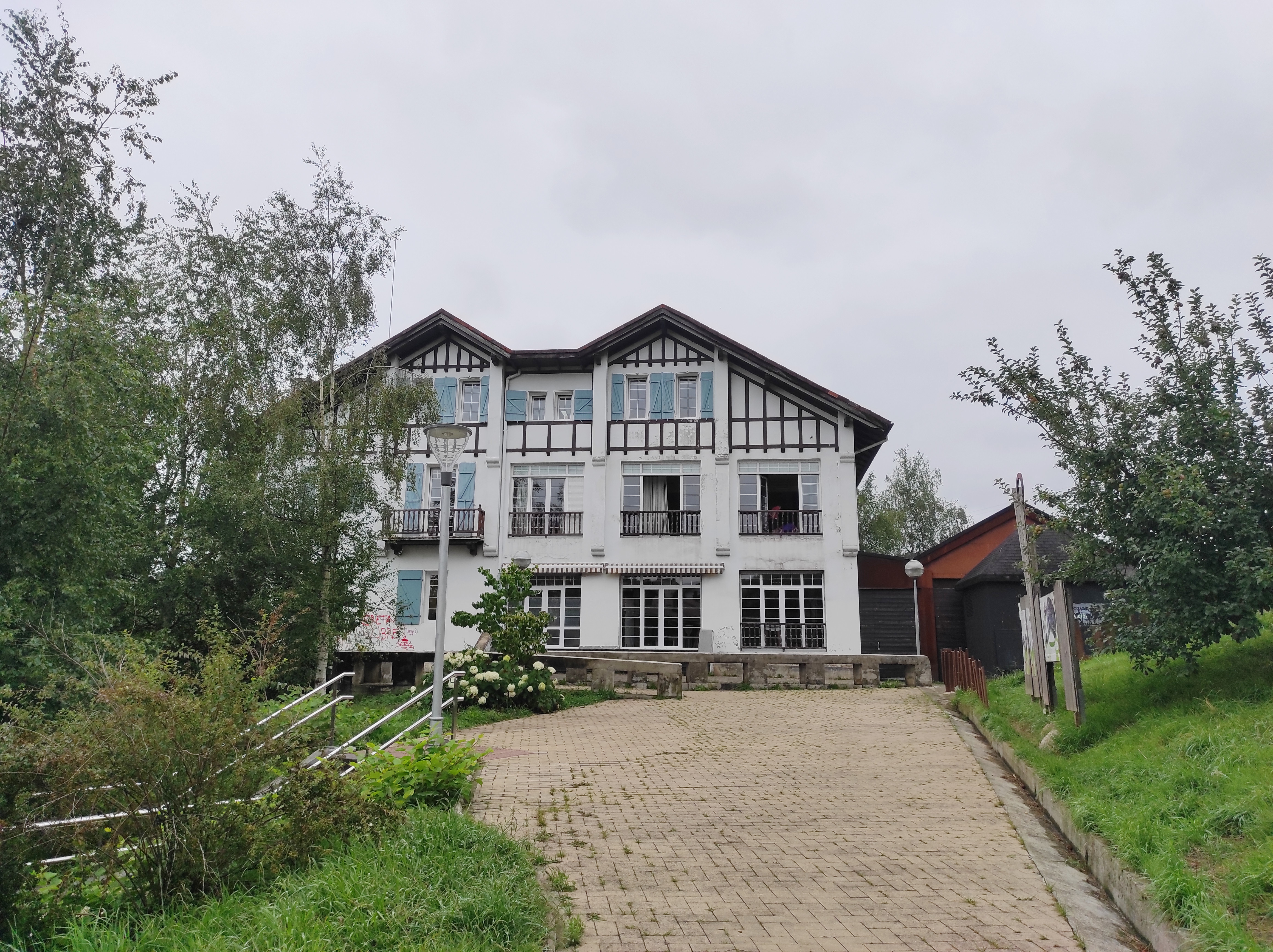 Casa de Cultura de Astigarraga - Biblioteca municipal